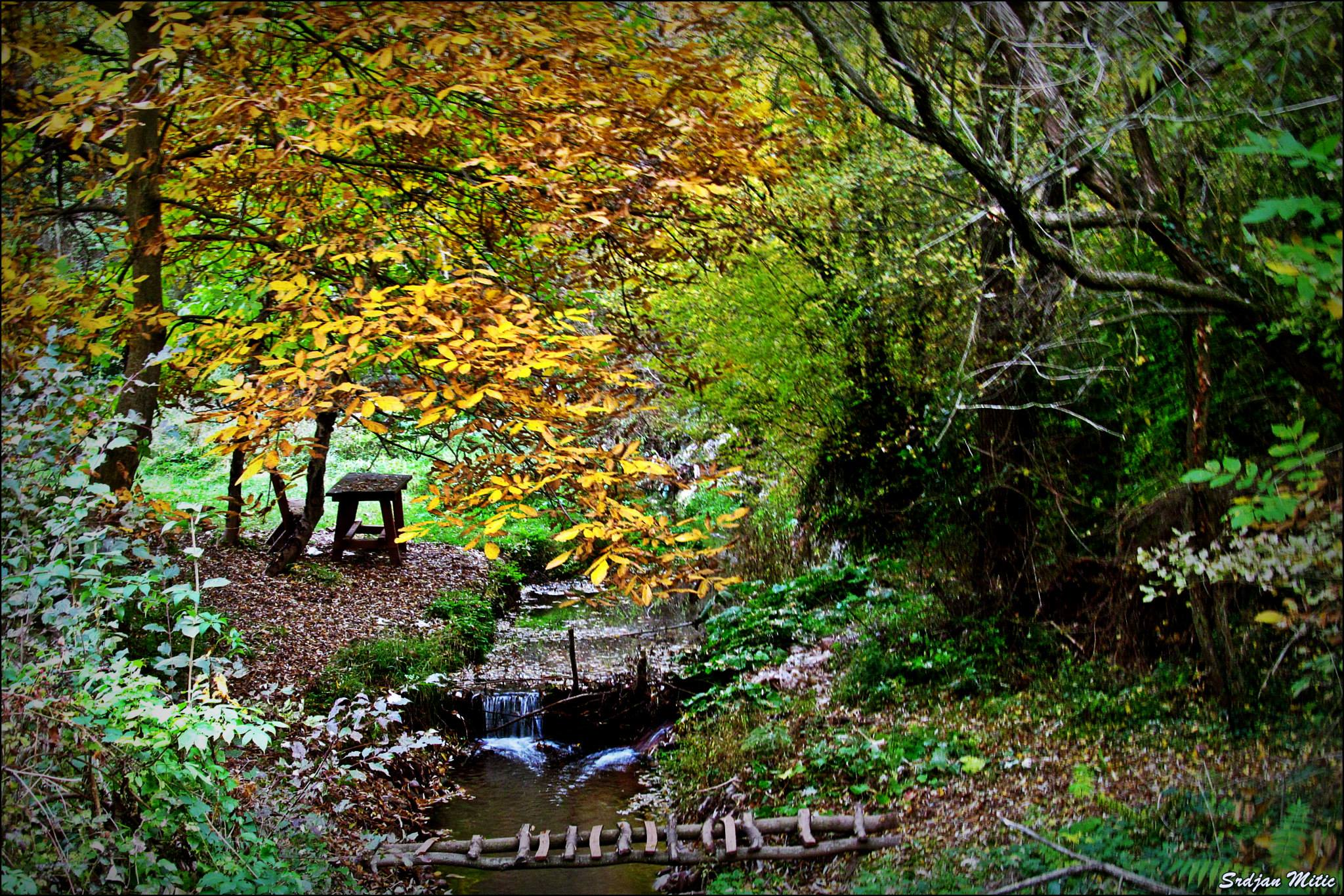 Српски (ћирилица): Јелашничка река, Нишка Бања, Србија